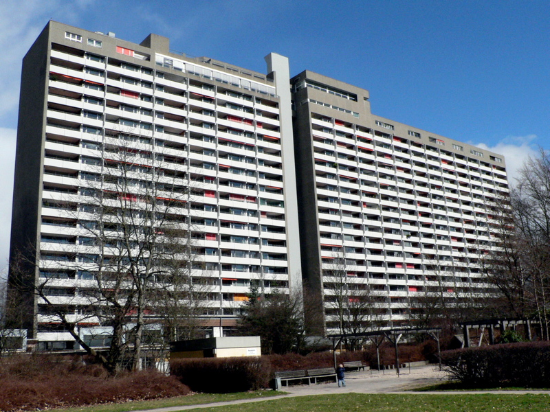 Einer der drei Asemwald-Häuserblöcke. In der Mitte befindet sich der zwischenhaltlose und öffentlich zugängliche Aufzug zum Panoramarestaurant und Schwimmbad - beides ist als etwas höherer Teil des Gebäudes in der Mitte zu erkennen. Autor: Michael Meding Quelle: Selbst fotografiert 2006